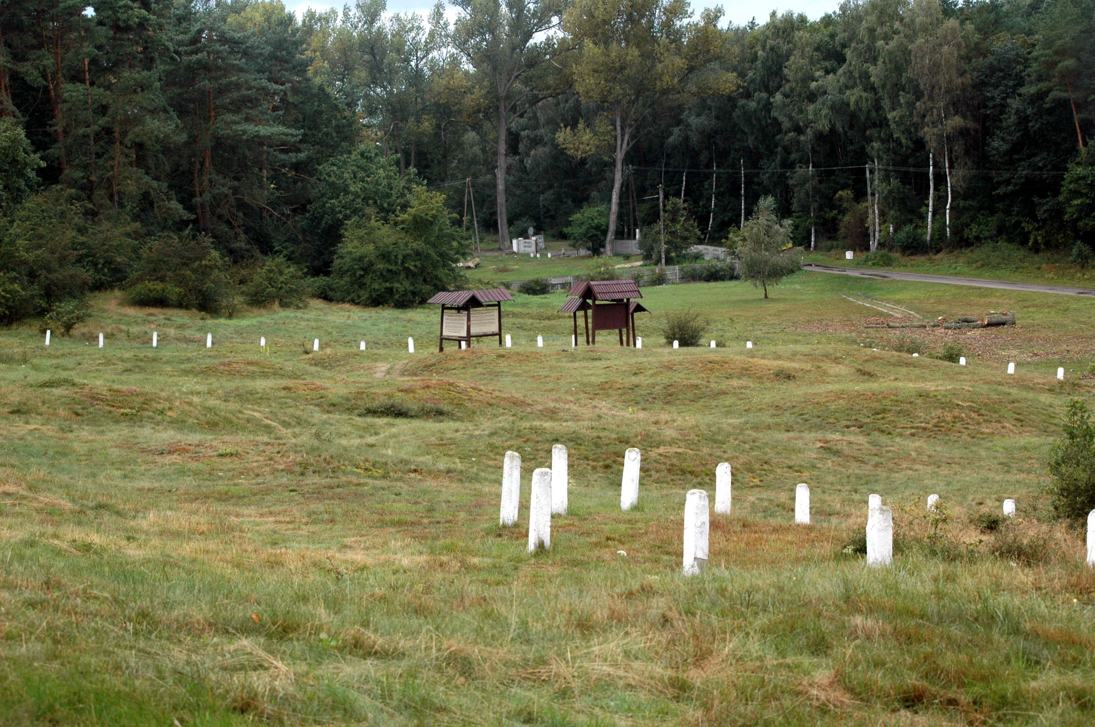 Wzgórze Wisielców w Wolinie